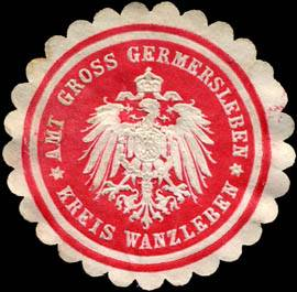 Sealing stamp Title: Amt Gross Germersleben - Kreis Wanzleben Description: rot, weiß, geprägt Place: Germersleben size: 4 cm